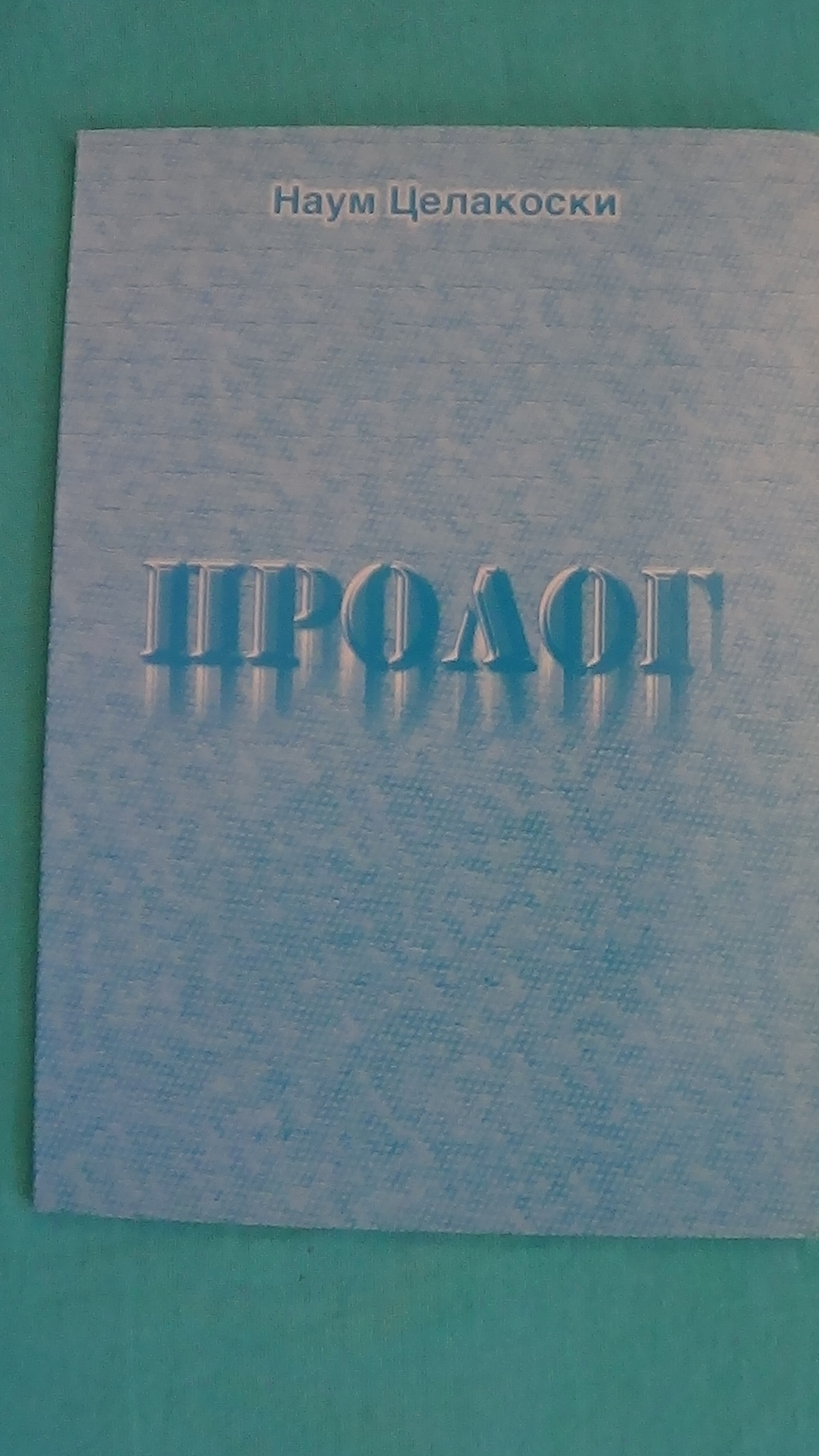 Корицата на „Пролог“, издание на авторот од 1998 година.